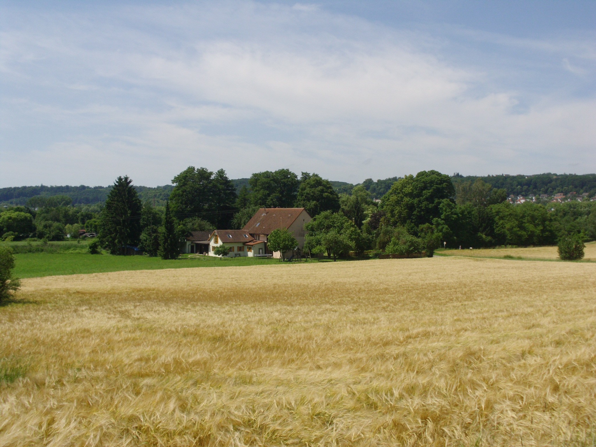 Kästleinsmühle, Ortsteil von Treuchtlingen im Landkreis Weißenburg-Gunzenhausen